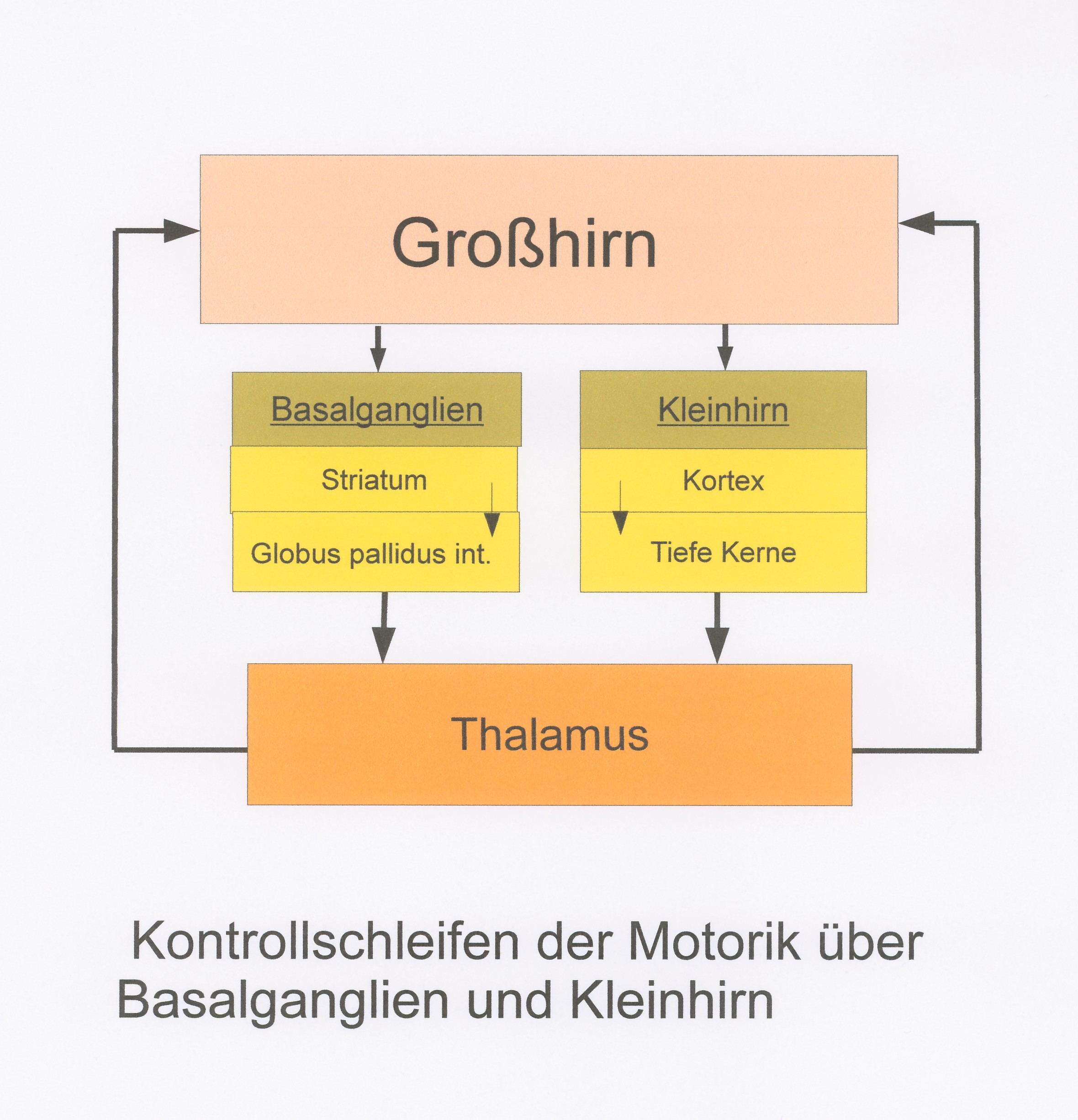 Es werden zwei Kontrollschleifen der Motorik im Hirn dargestellt. Ausgehend vom Großhirn werden die Schleifen über einerseits die Basalganglien, andererseits über das Kleinhirn und folgend über den Thalamus zurück zum Großhiern gezeigt. Modulationen der Ausführung des Bewegungsablaufs können sowohl in den Basalganglien als auch im Kleinhirn erfolgen